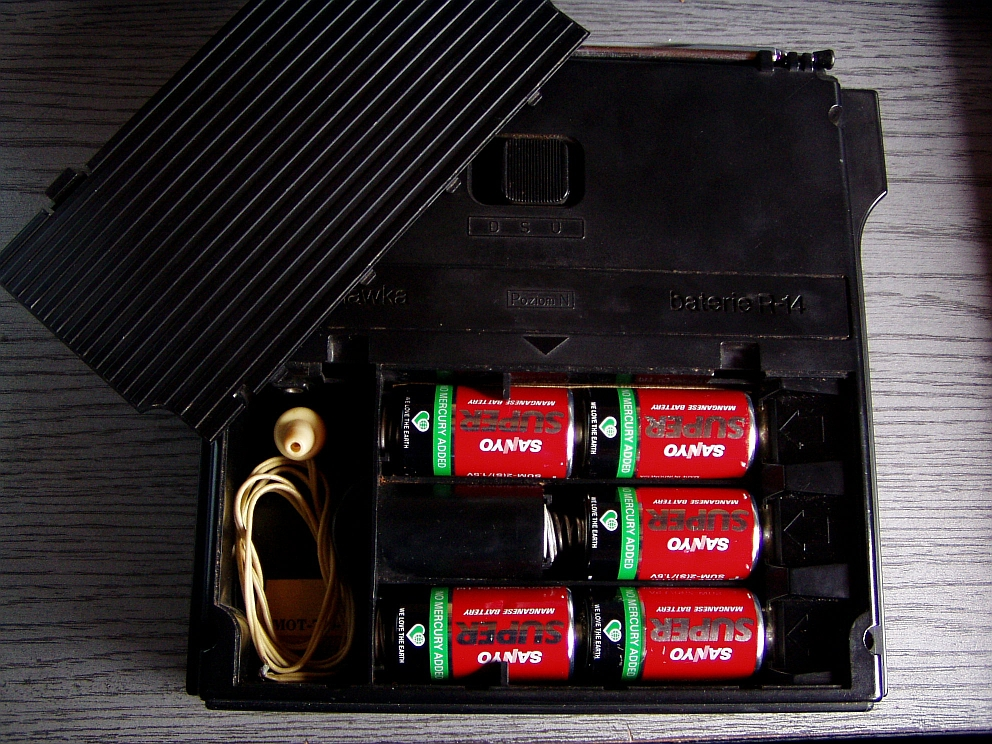 Radio Major MOT 759